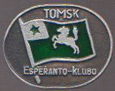 Insigno de Tomska Esperanto-Klubo